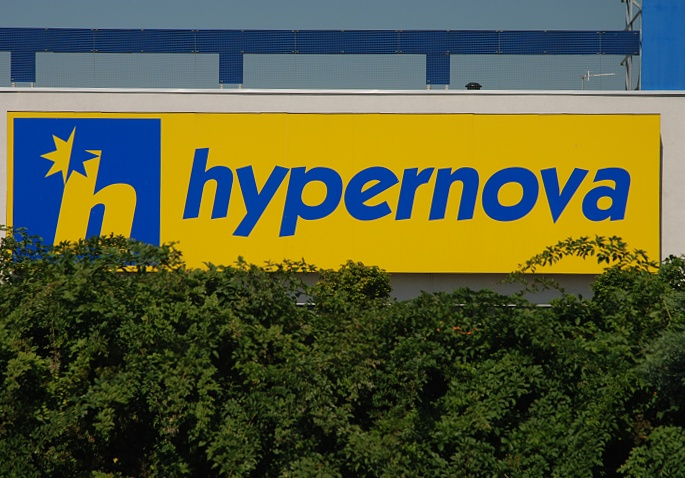 Hypernova v Orlové (description from the article Hypernova (obchodní řetězec))